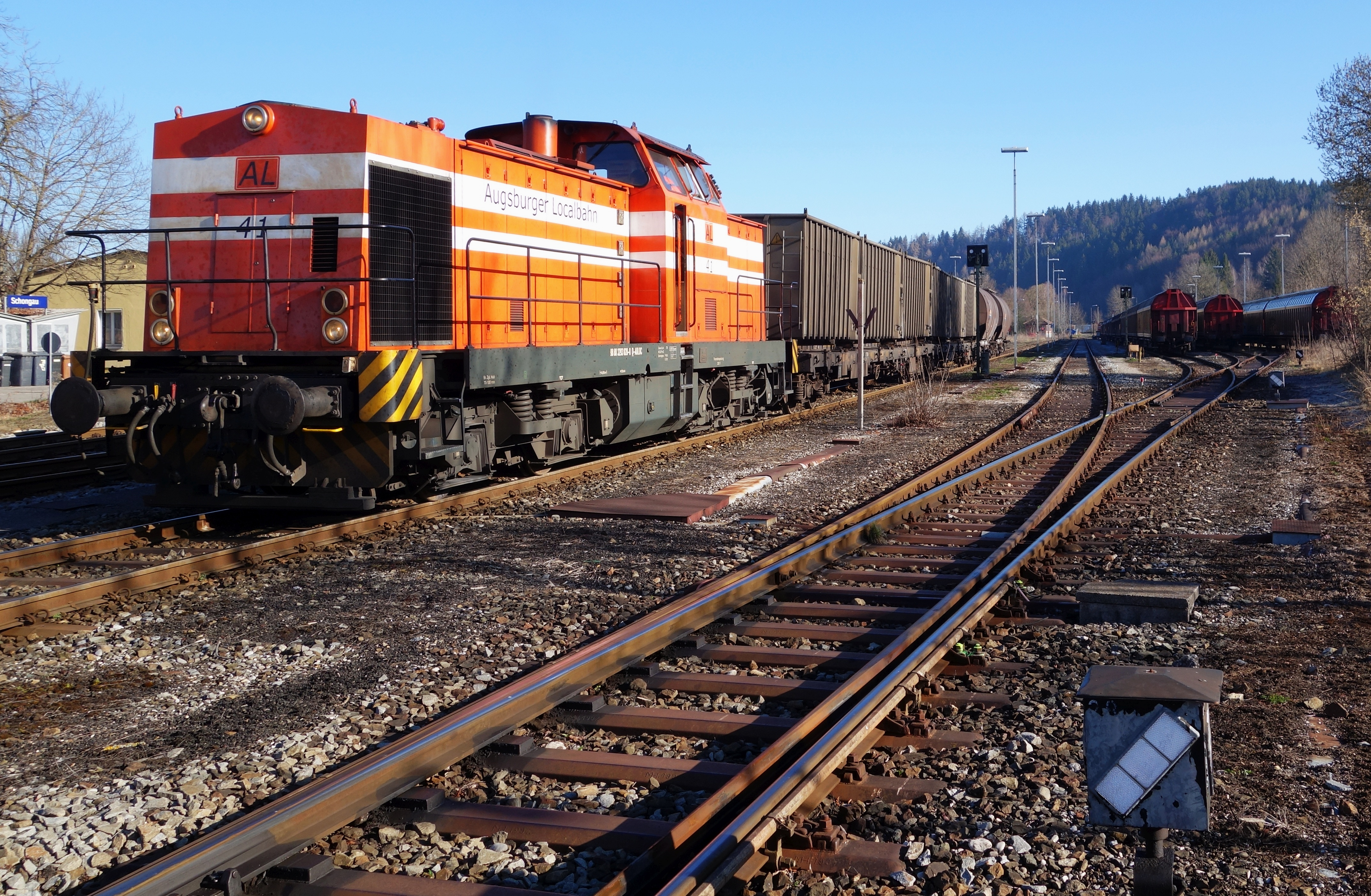 Güterzug-Lokomotive AL 41 der Augsburger Localbahn und abgestellte Güterwagen im Bahnhof Schongau